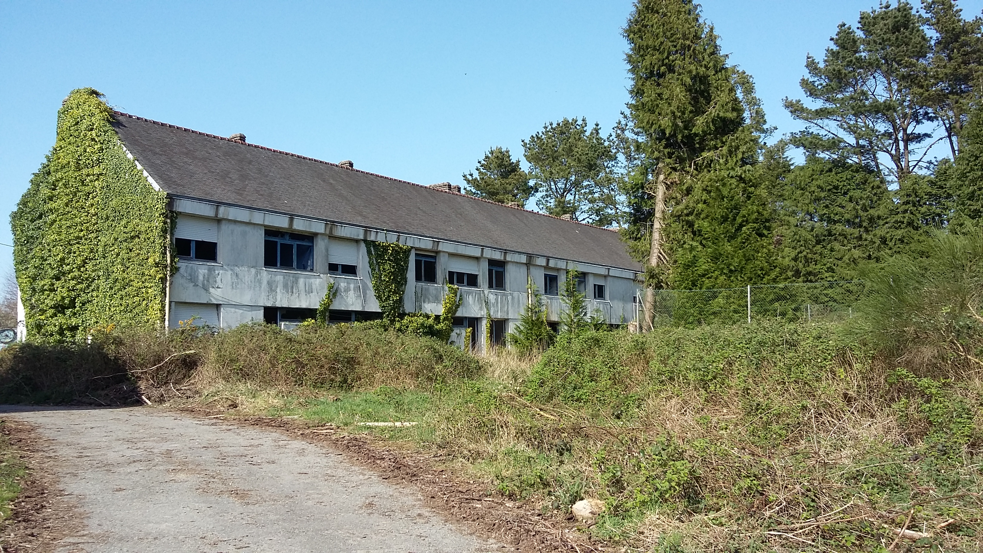 Cité TDF de Commana (Finistère, France).